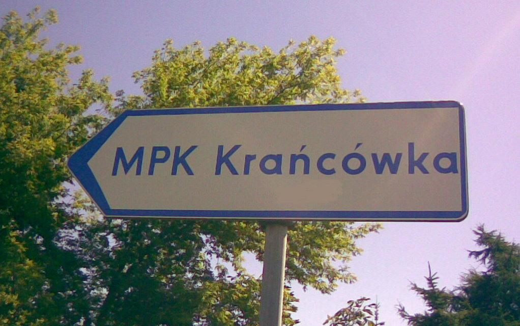 Znak kierunku "krańcówka". Nazwa pętli tramwajowej lub autobusowej używana TYLKO w Łodzi i aglomeracji łódzkiej, zdjęcie zrobione w Kalonce (pętla autobusowa przy ul. Aksamitnej)